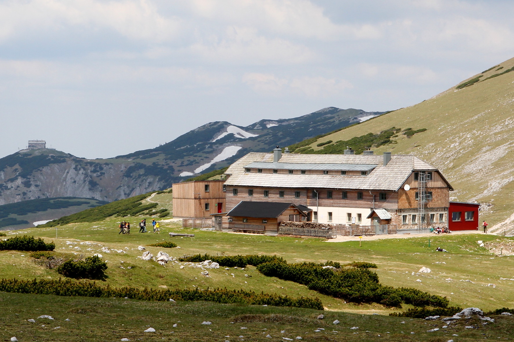 Südansicht des Karl-Ludwig-Hauses auf der Rax. Links im Hintergrund das Habsburghaus am Grieskogel und rechts der Anstieg zum Predigtstuhl.